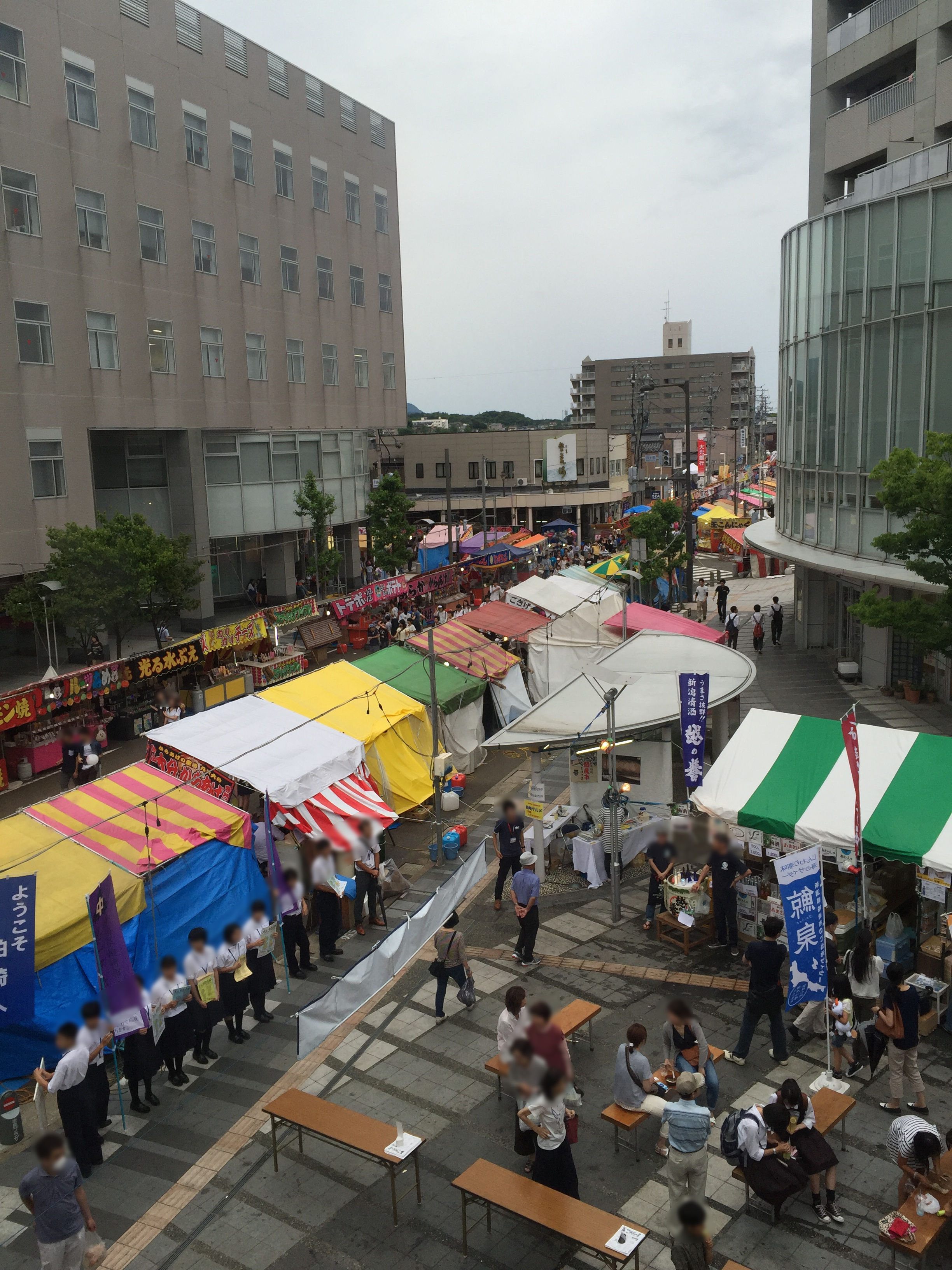 柏崎市で毎年6月に行われるえんま市の様子。市民プラザ2階から撮影。人物の顔が識別できる箇所にはぼかしをかけています。2016年撮影。